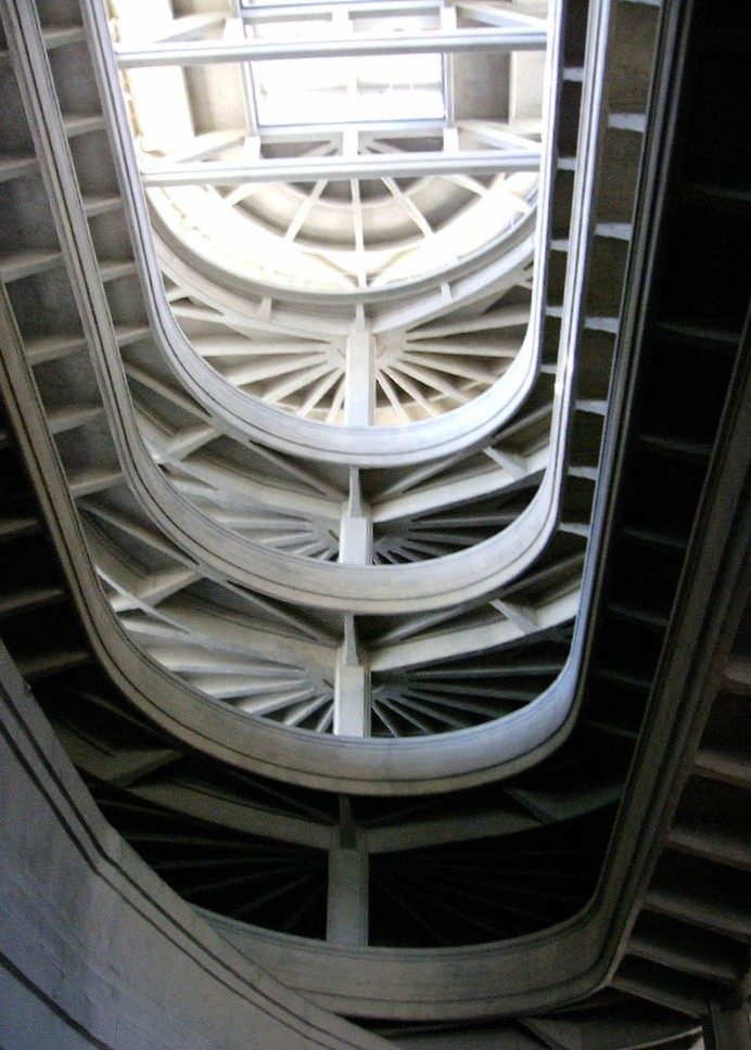 author: .mau. La rampa elicoidale del Lingotto a Torino Helix ramp - Lingotto factory, Torino, Italy